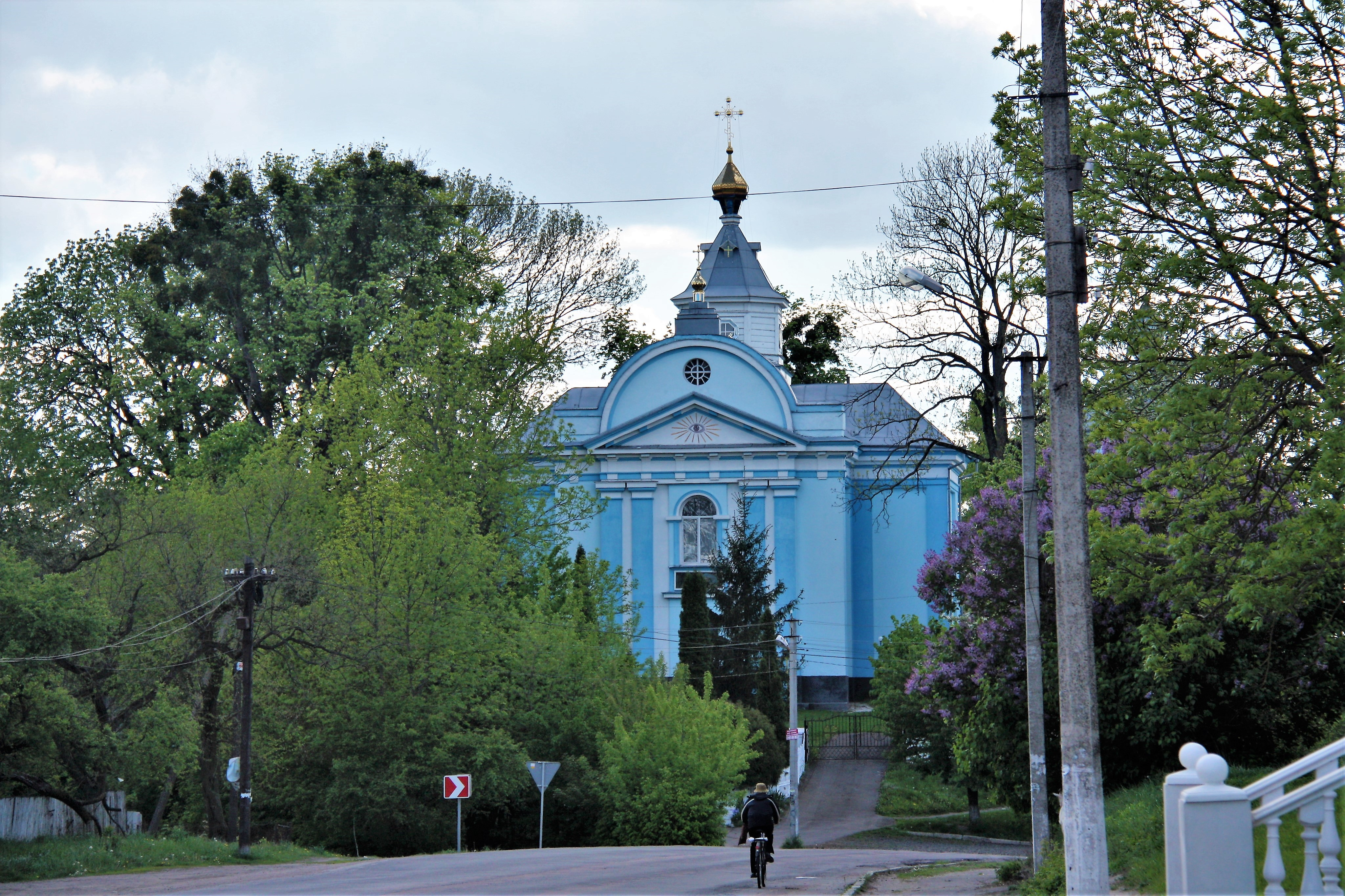 Церква Різдва Христового, Клевань